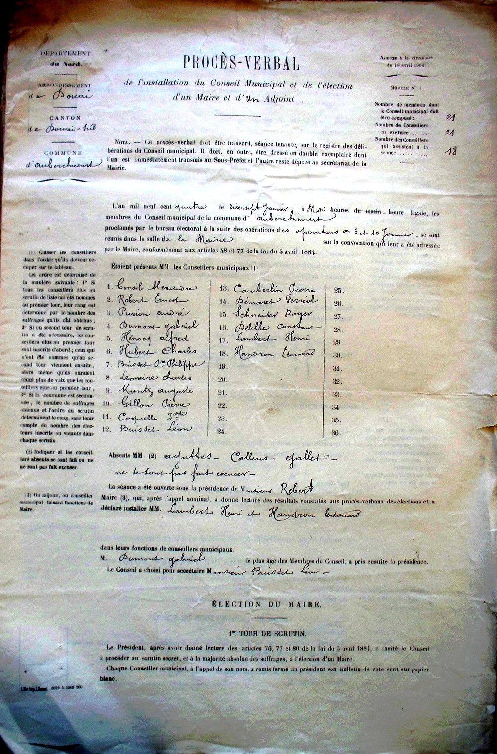 Procès verbal d'installation du conseil municipal le 17 janvier 1904, en 1ére position: CONSIL Alexandre